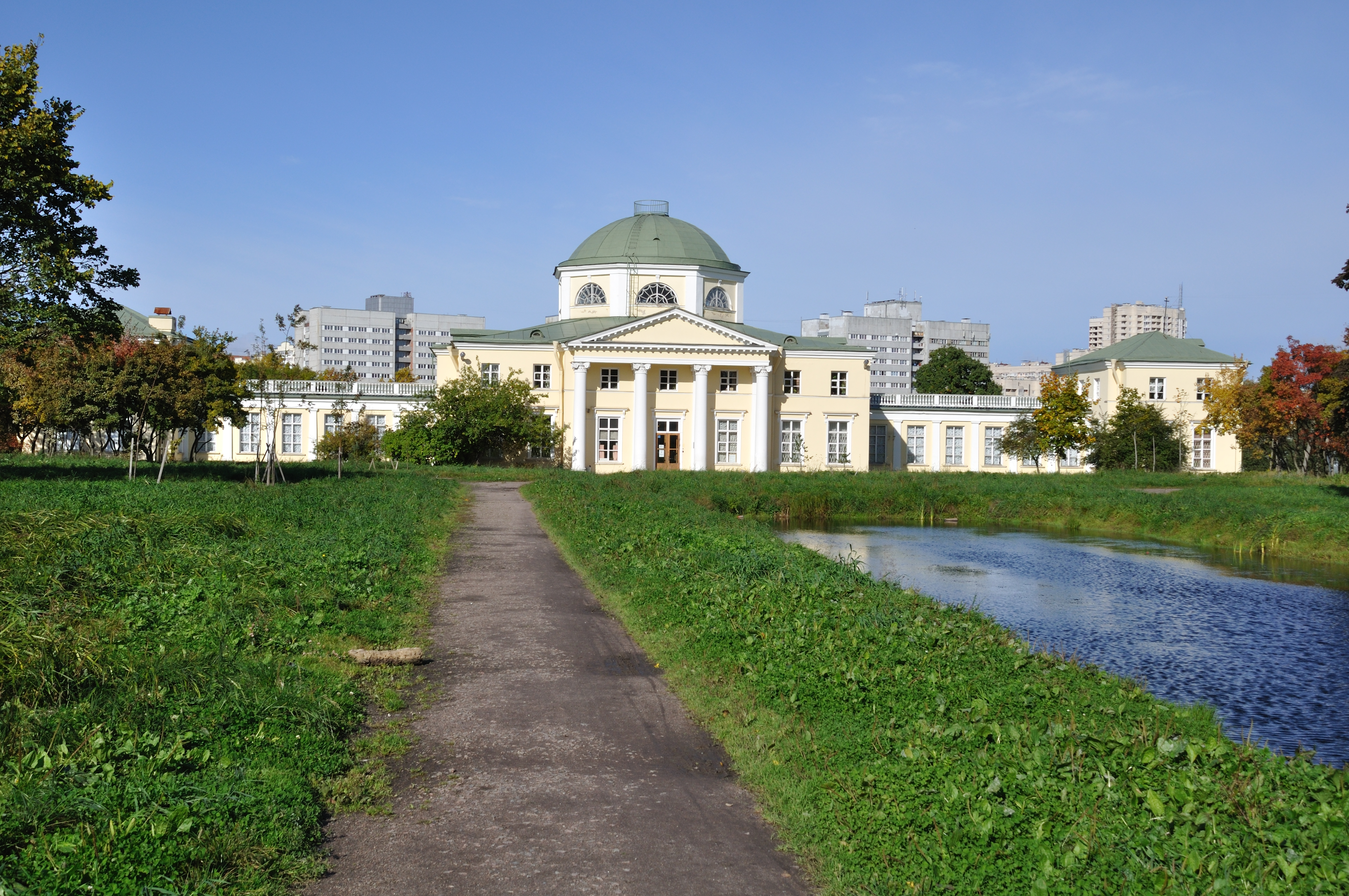 Дача Чернышева И. Г. «Александрино»